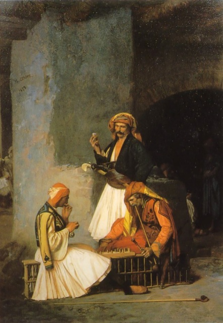 Joueurs de Dames